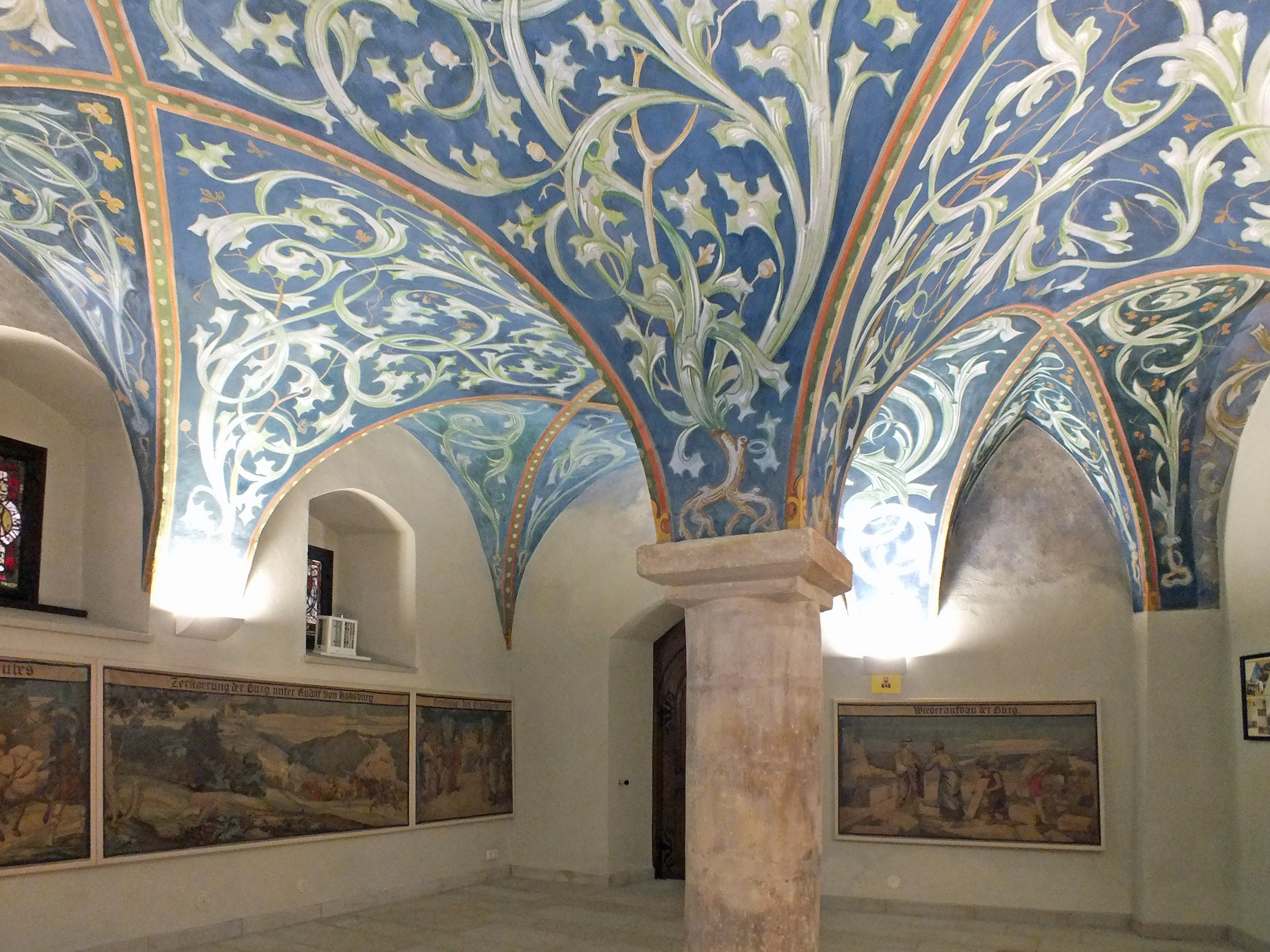 Der Orlamünde-Saal in der Burg Lauenstein